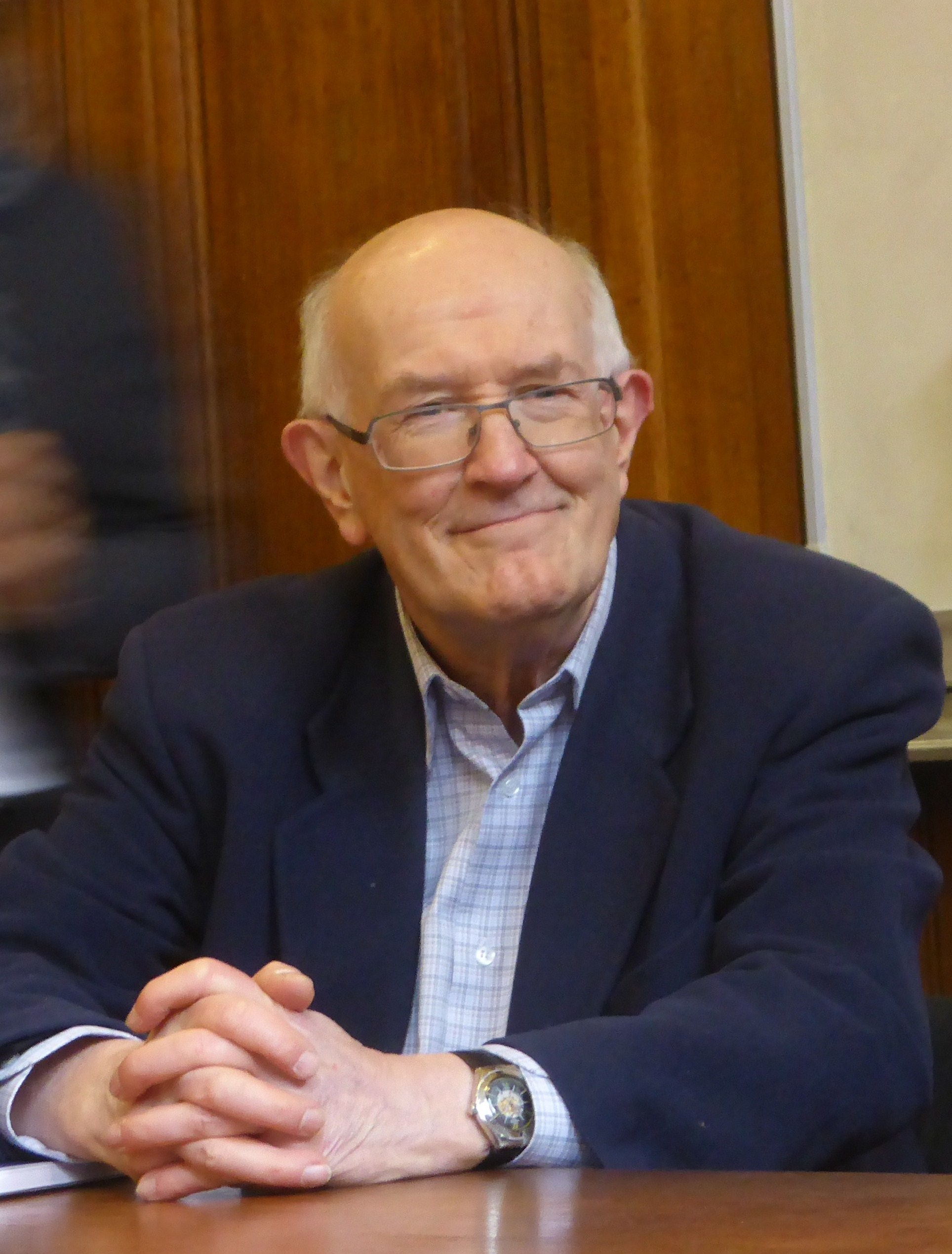 Marcel Gauchet lors d'une conférence sur la démocratie en France au Collège de Philosophie (25 février 2017).